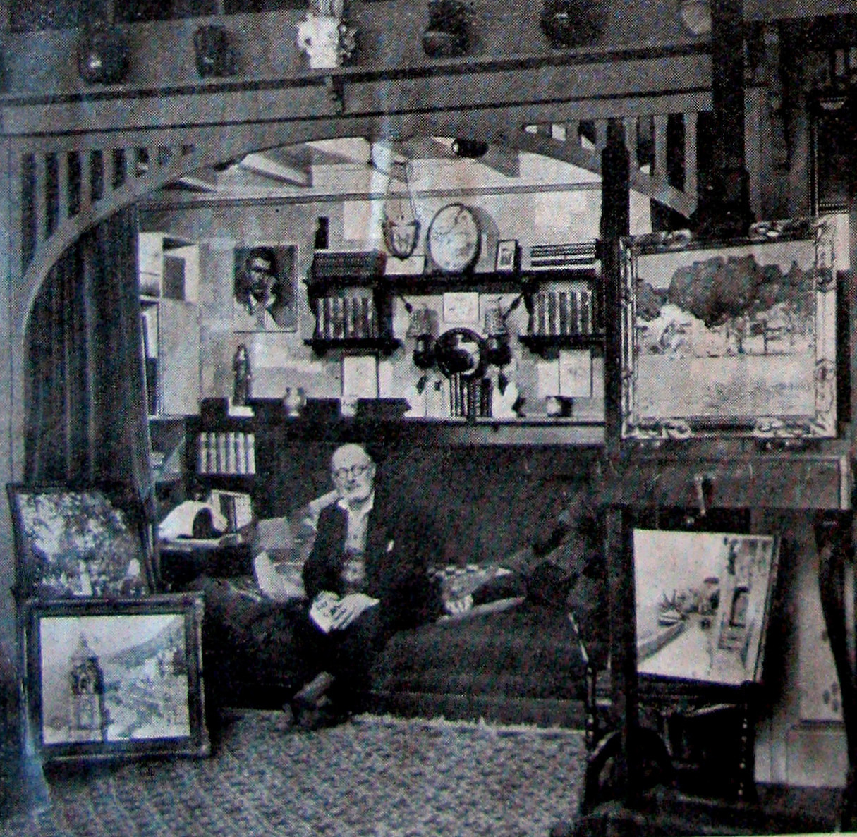 Emile Beaussier dans son atelier